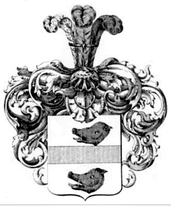 Wappen derer von Damnitz